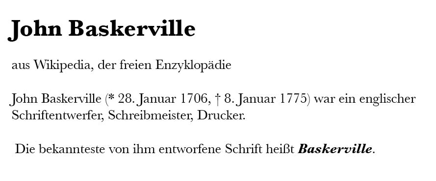 Baskerville